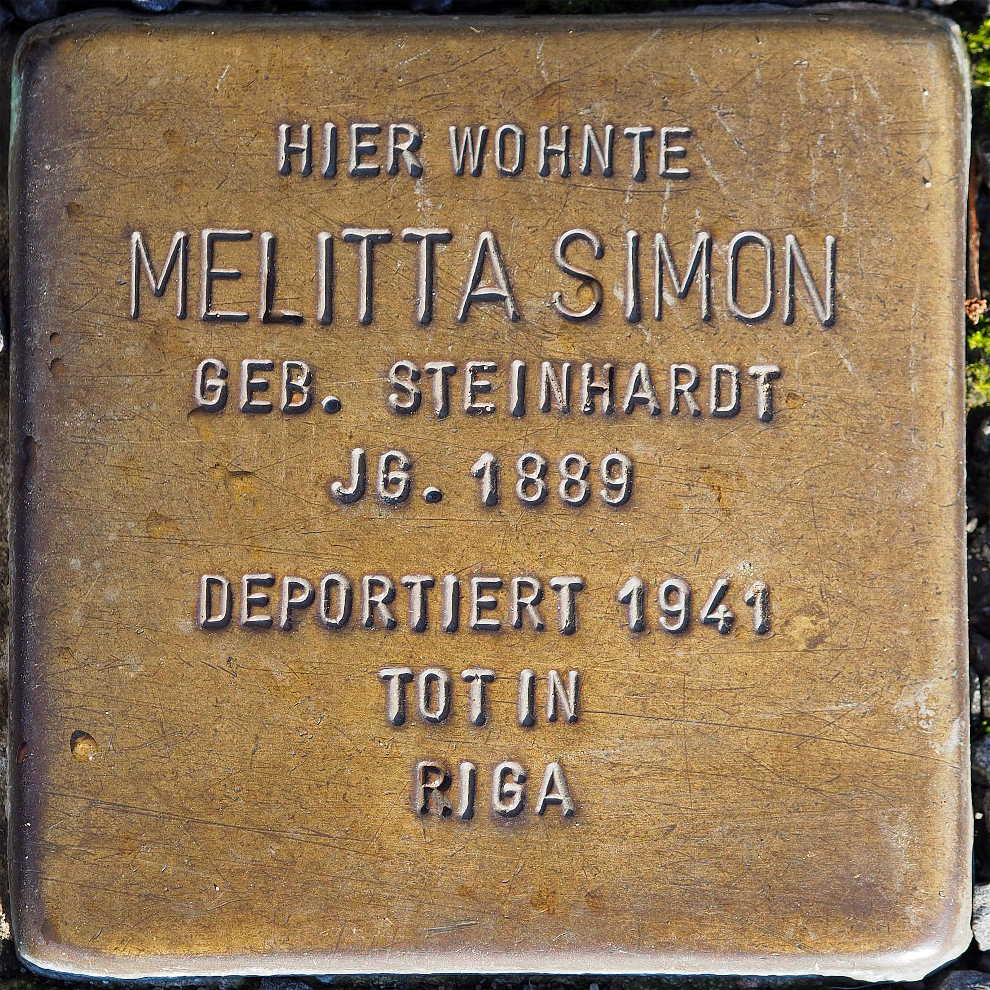 Stolpersteine MG: Simon, Melitta